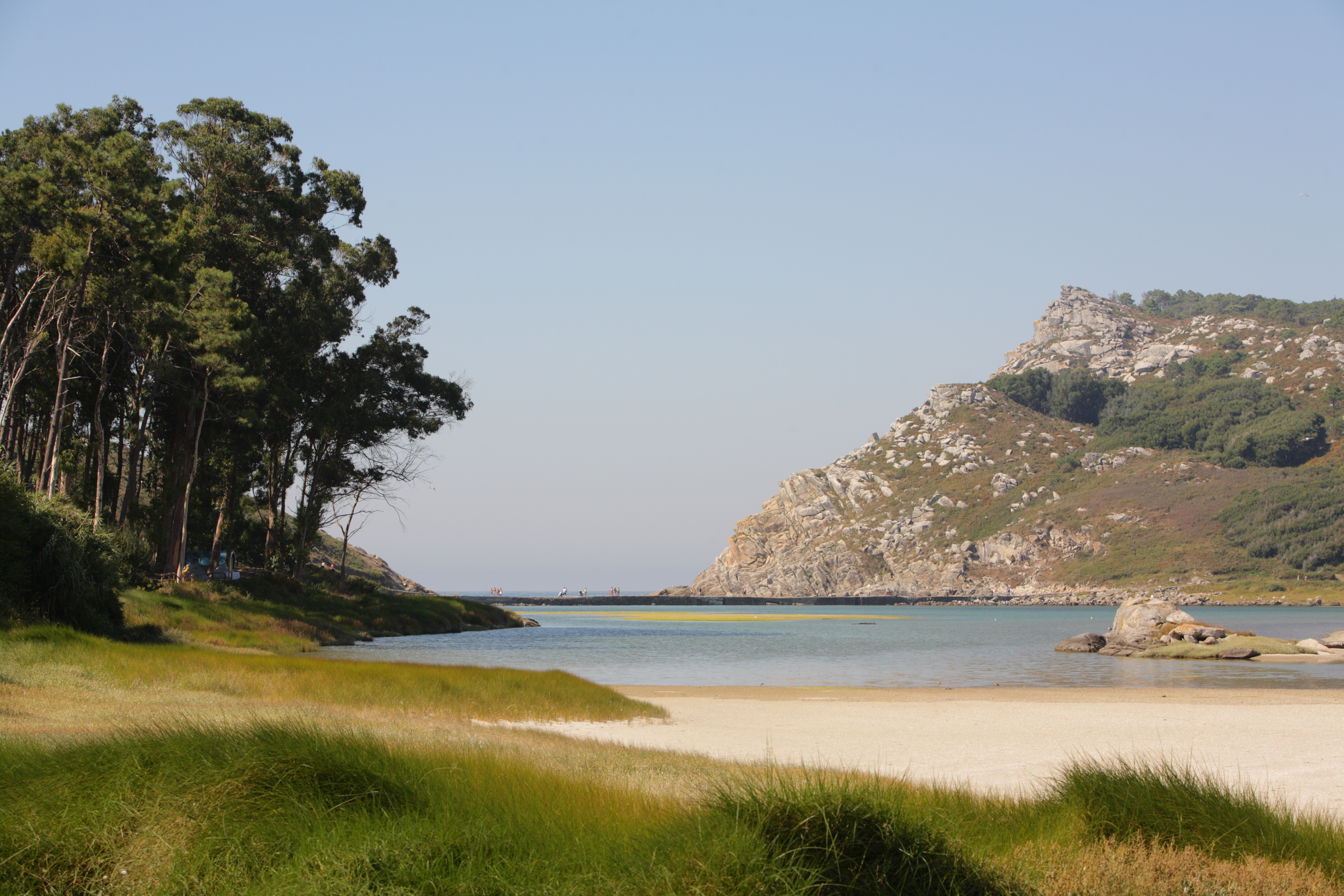 "Lago dos nenos" Islas Cíes This is a photography of a Special Area of Conservation in Spain with the ID: ES0000001. Natura2000 entry, EEA entry